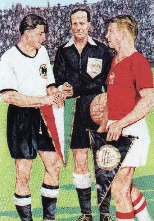 Les deux capitaines de la finale de Coupe du monde de football 1954 (G. Walter, D. Puskas, arbitre Orlandini), vignette n°289.